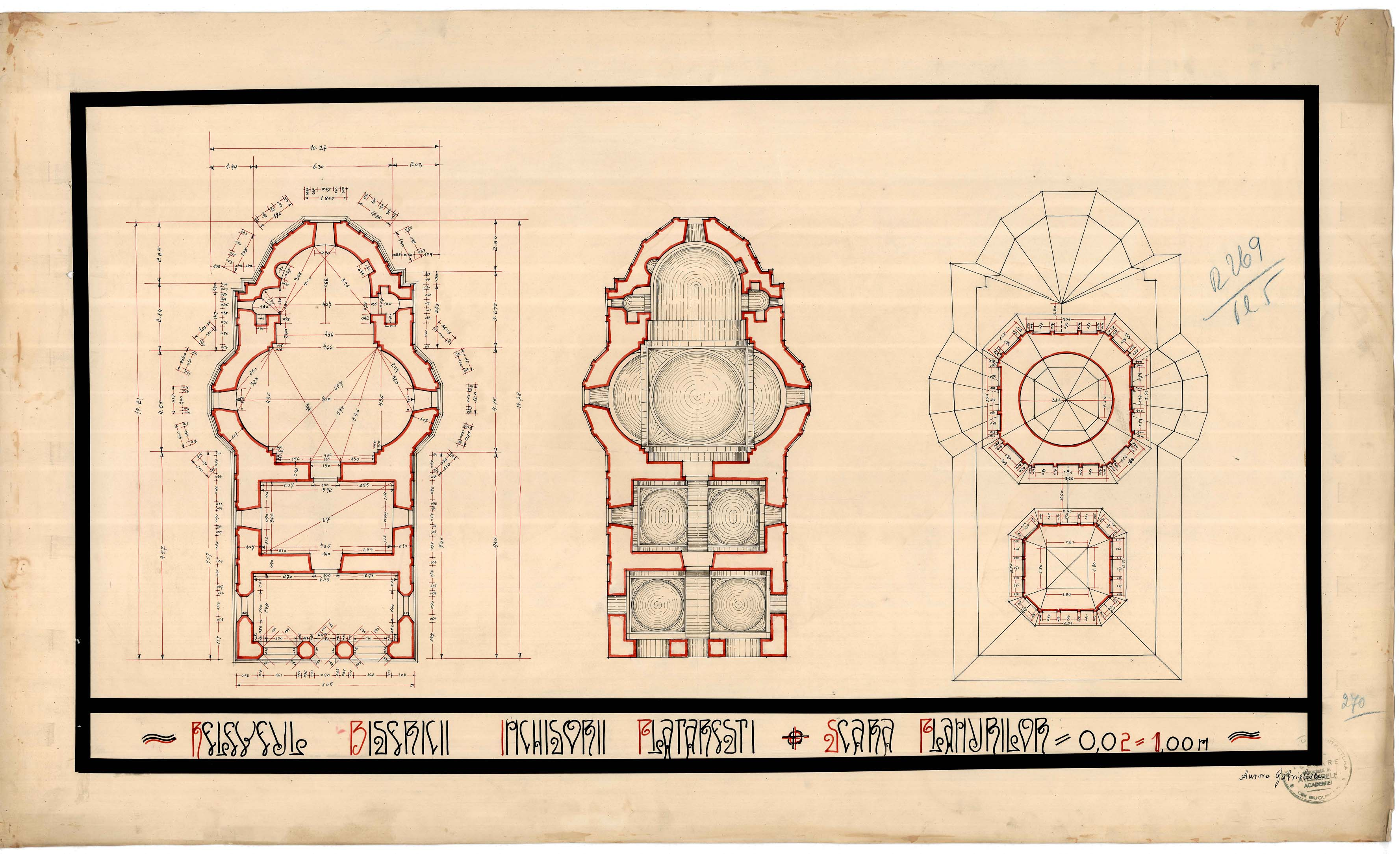 Releveu arhitectonic al Mănăstirii Plătăreşti, realizat în 1936 This work is free and may be used by anyone for any purpose. If you wish to use this content, you do not need to request permission as long as you follow any licensing requirements mentioned on this page.